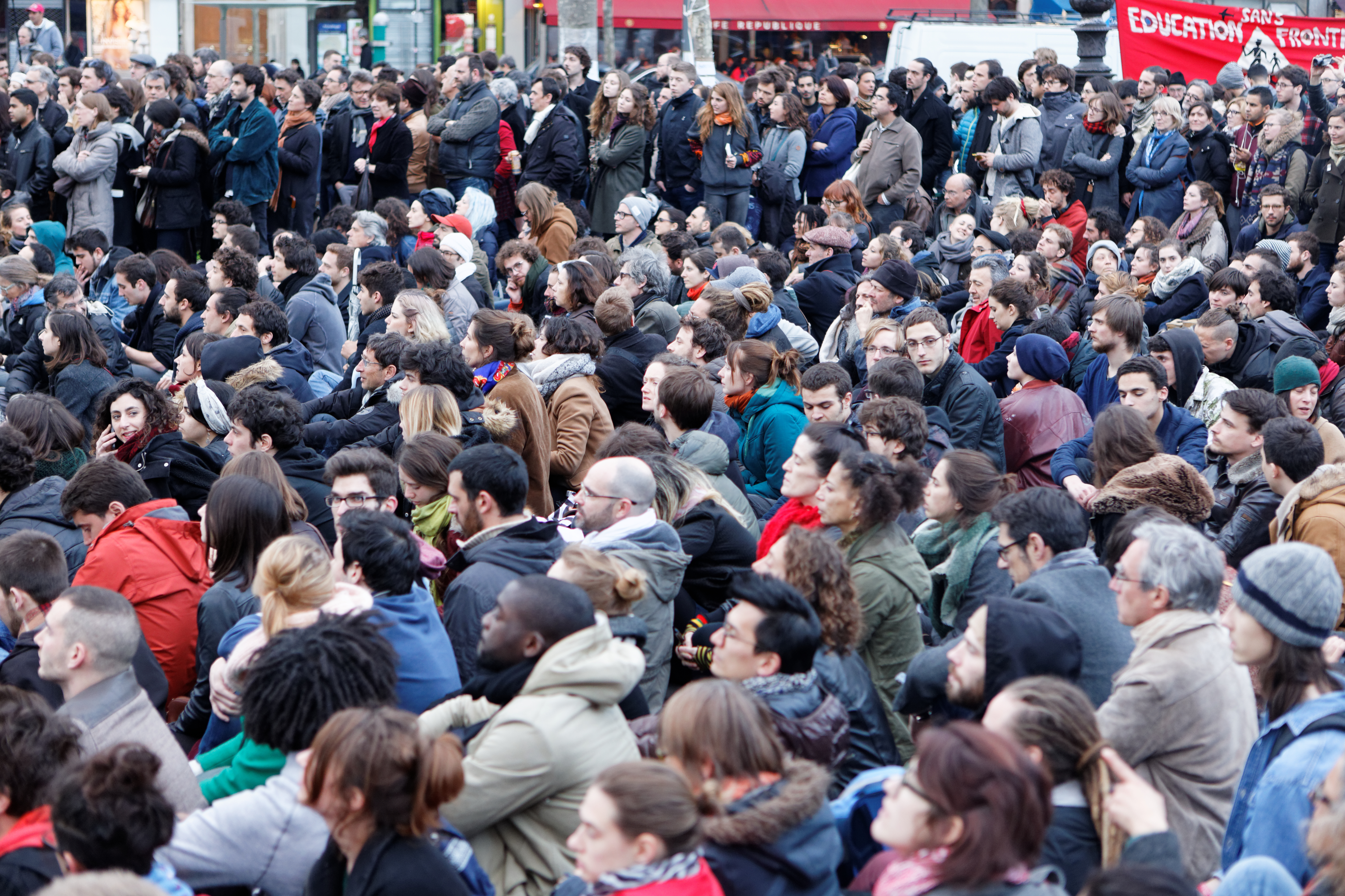 Rassemblement "Nuit Debout" à Paris le 42 mars.